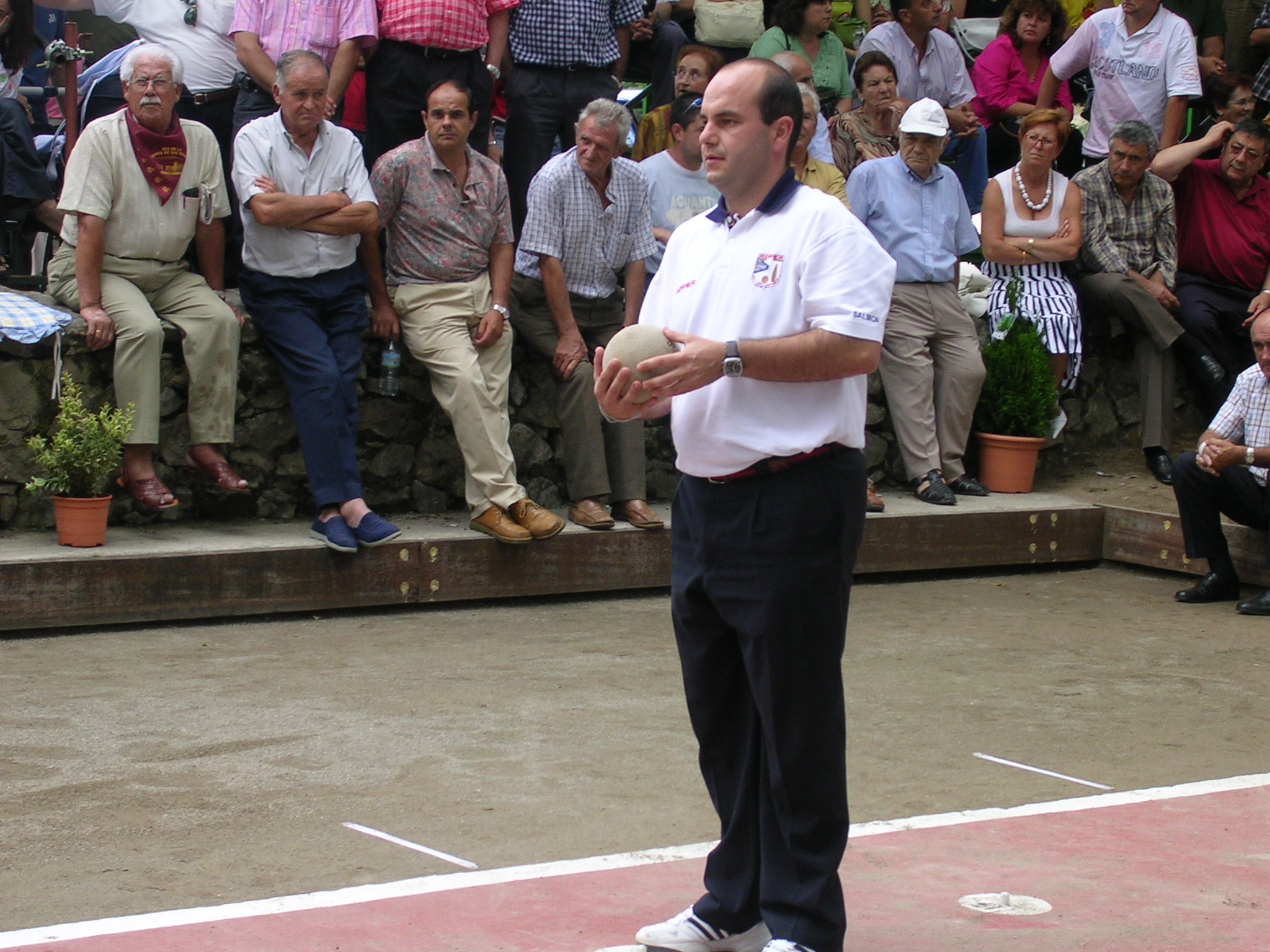 Jesús Salmón disputando el torneo del Dia Instituciones en Puente San Miguel en 2006.